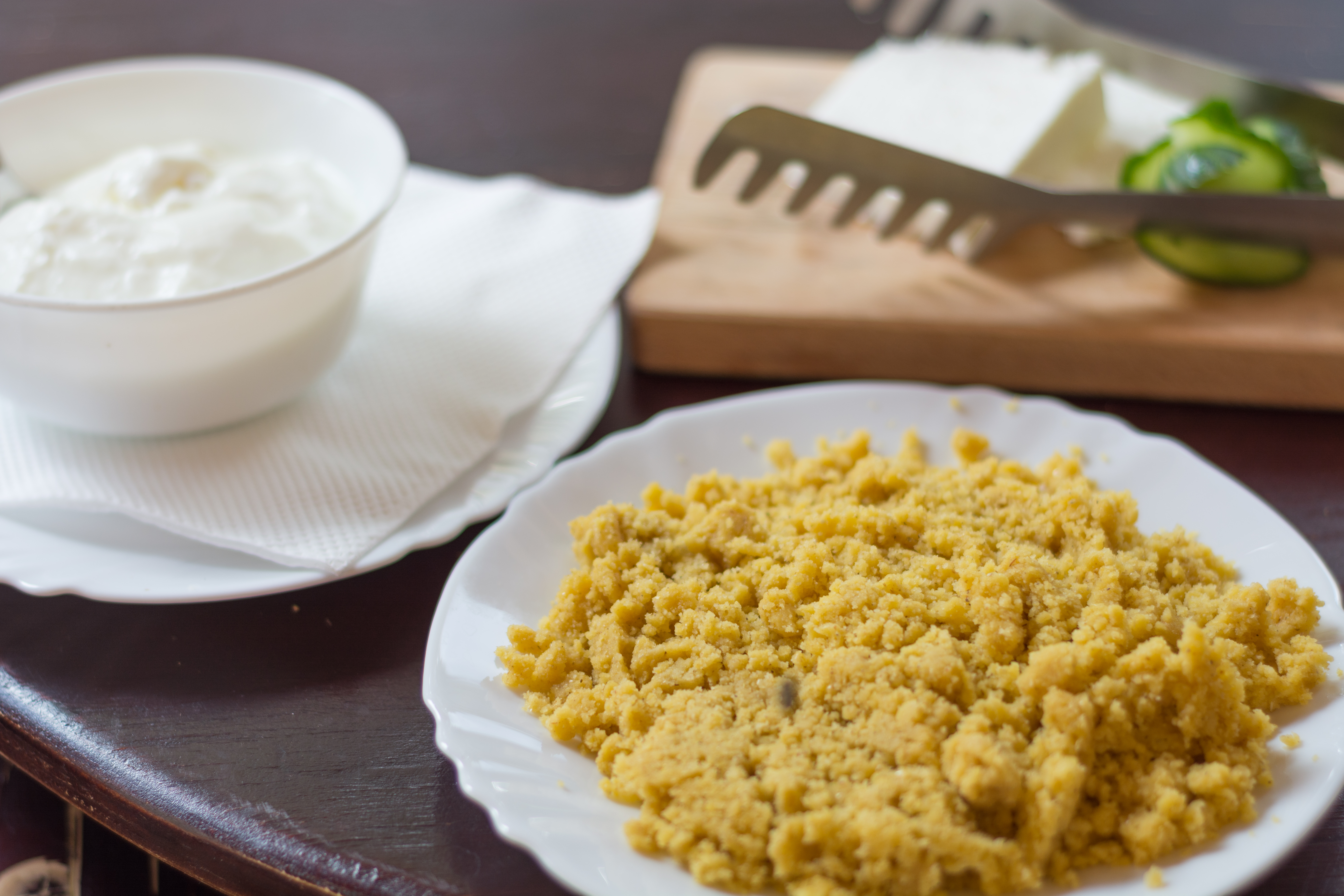 Качамак подготвен на традиционален начин во ресторанот Кораб Трница во с.Трница, Општина Маврово и Ростуша